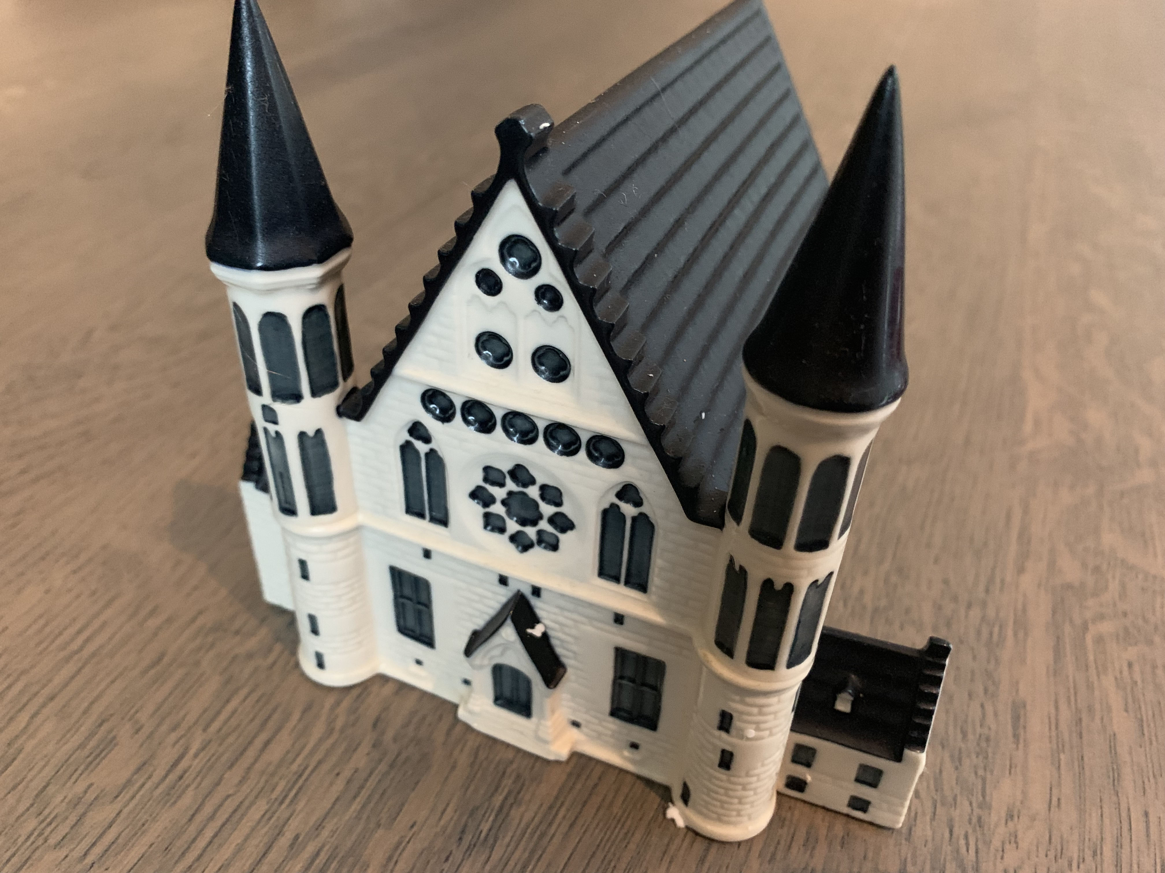 Klm huisje ridderzaal (collecters item)